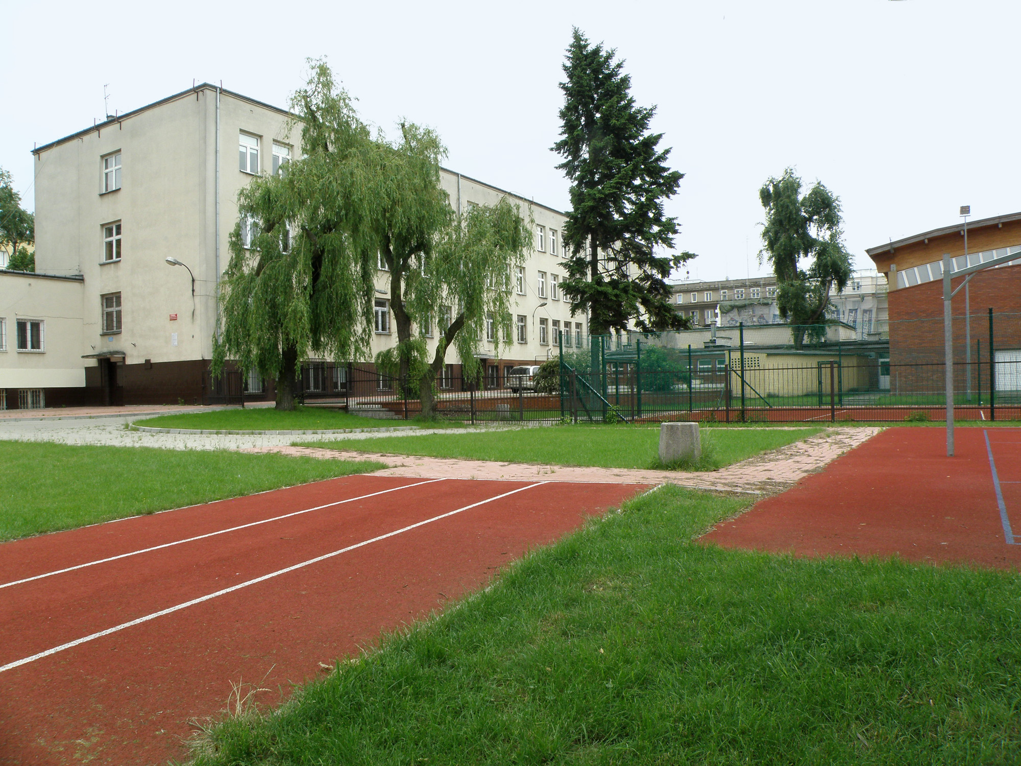 97 Liceum Ogólnokształcące, Zespół Szkół nr 12 im. Olimpijczyków Polskich, ul. Siennicka 15, Warszawa, Praga Południe